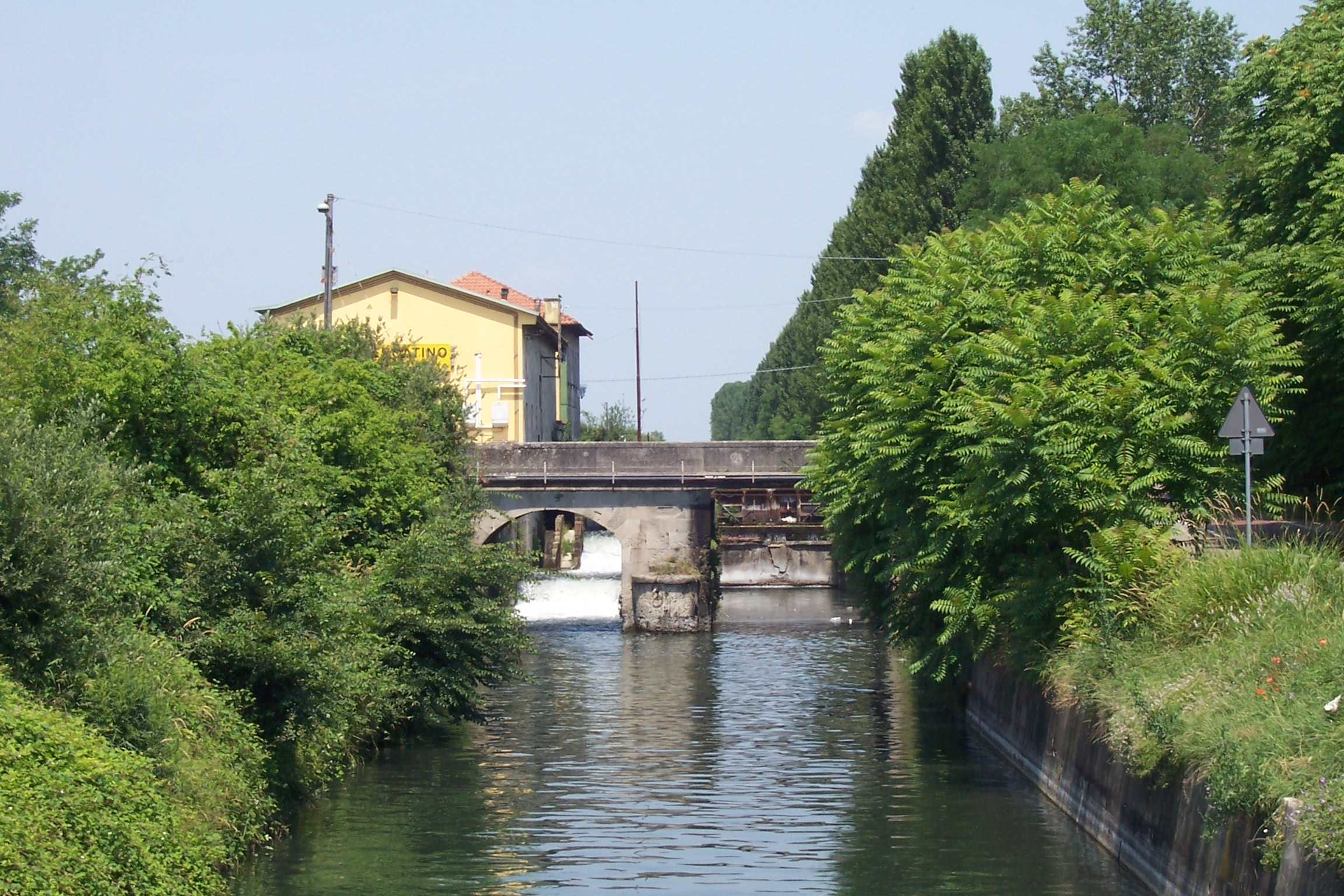 Un Tratto del naaviglio Pavese a ( Nivolto Giussago ) Prov. PV